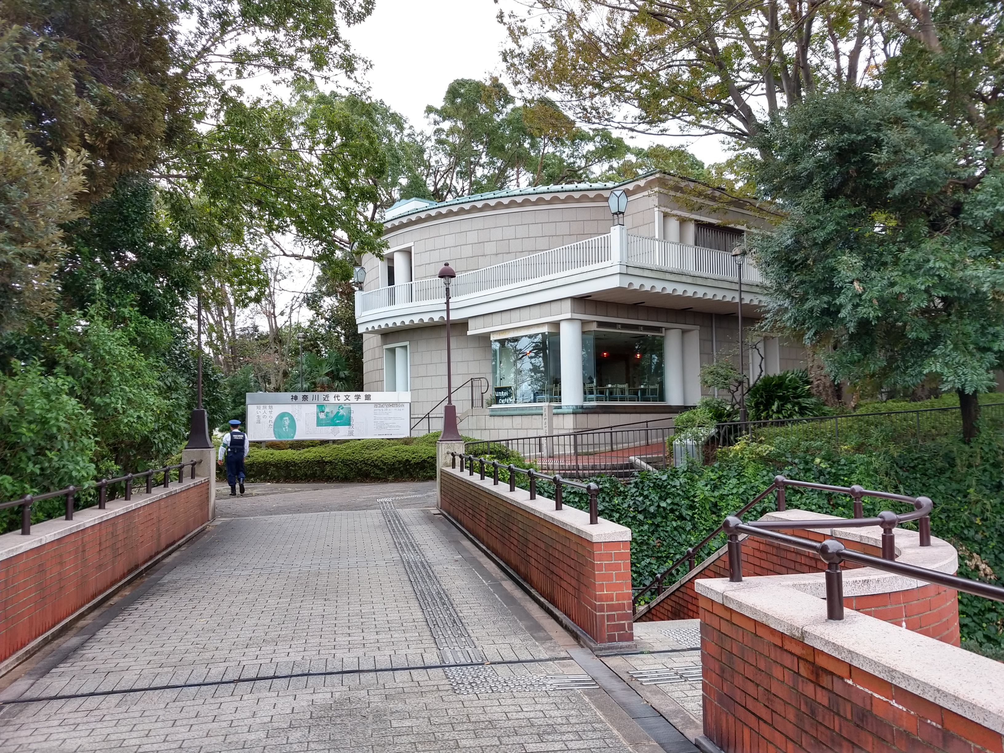 中島敦展開催中の神奈川近代文学館。霧笛橋から。2019年10月19日。